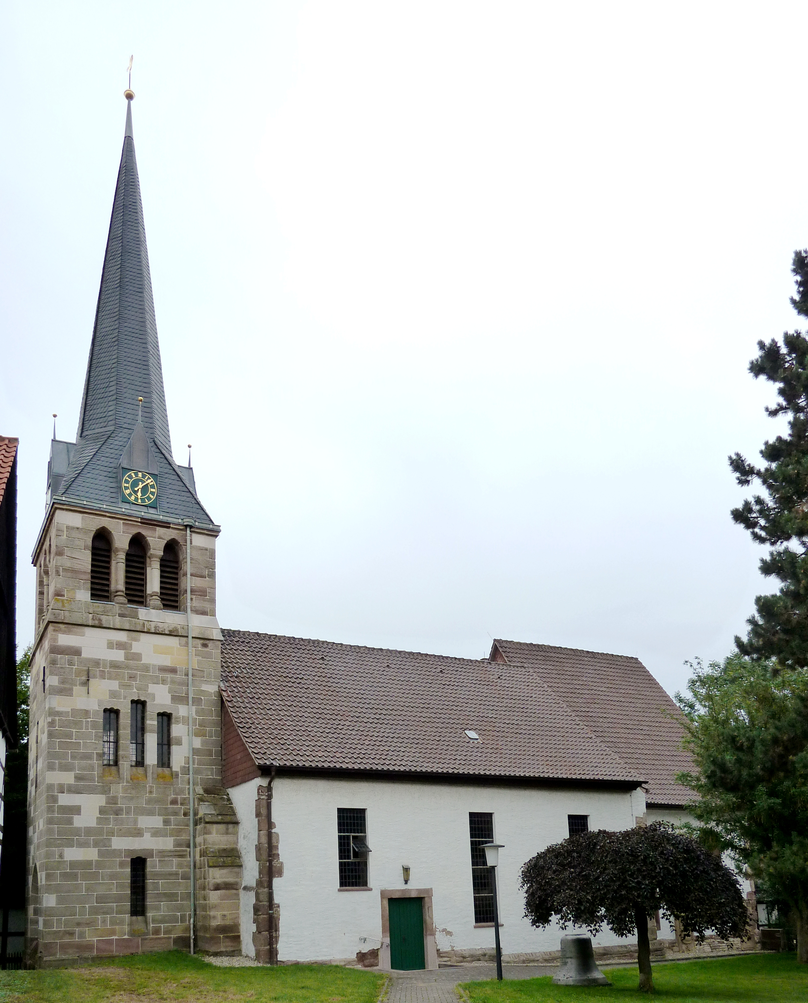 Ev.-luth. Kirche St. Lamberti in Hevensen, Stadt Hardegsen, Niedersachsen. Langhaus im Kern gotisch (mit Mauerteilen des romanischen Ursprungsbaus), umgestaltet 1782, Fenstererneuerung 1805, neugotischer Turm 1885/86 nach Plänen von Conrad Wilhelm Hase